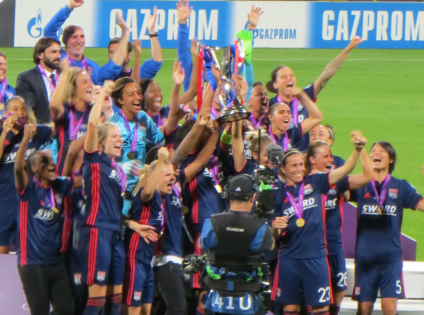 Фінал жіночої Ліги чемпіонів 2018 у Києві. Вольфсбург - Ліон 1:4